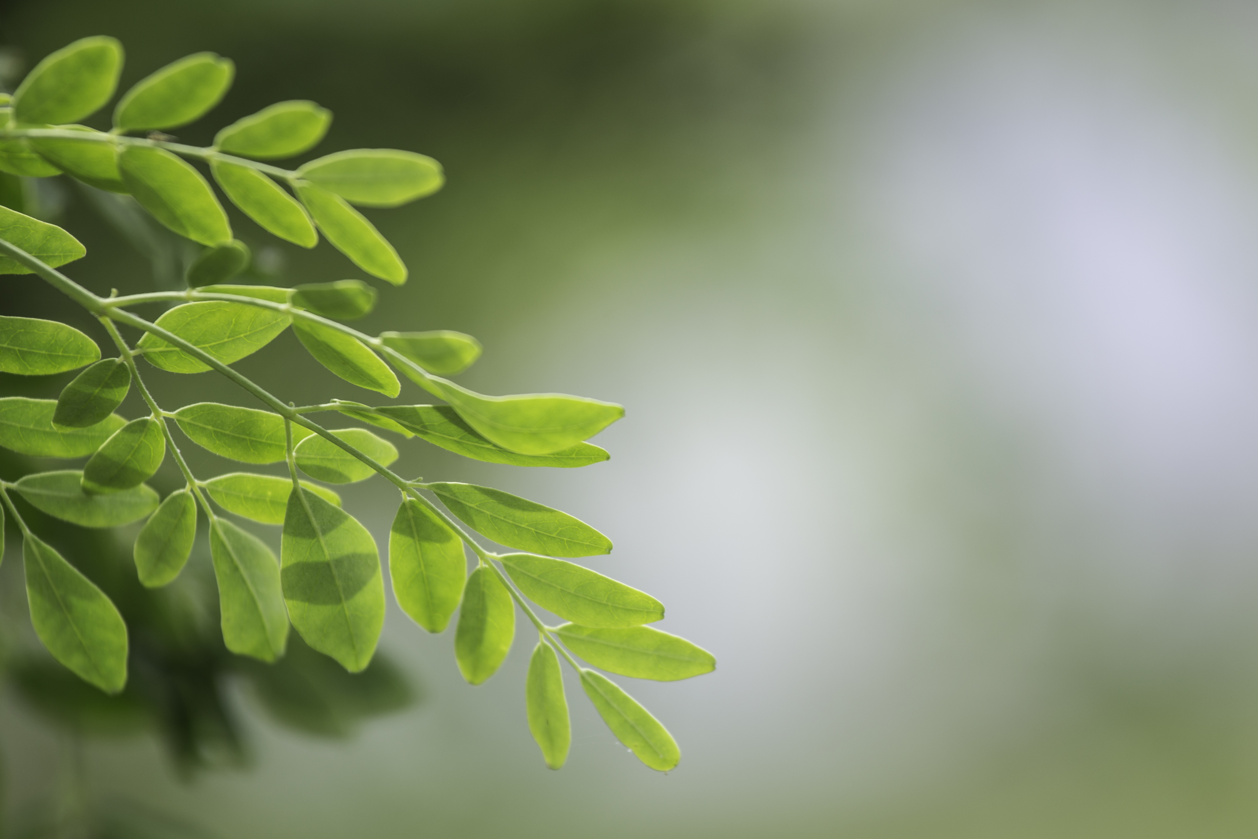 Moringa oleifera Blätter (Sanleaf Moringa)